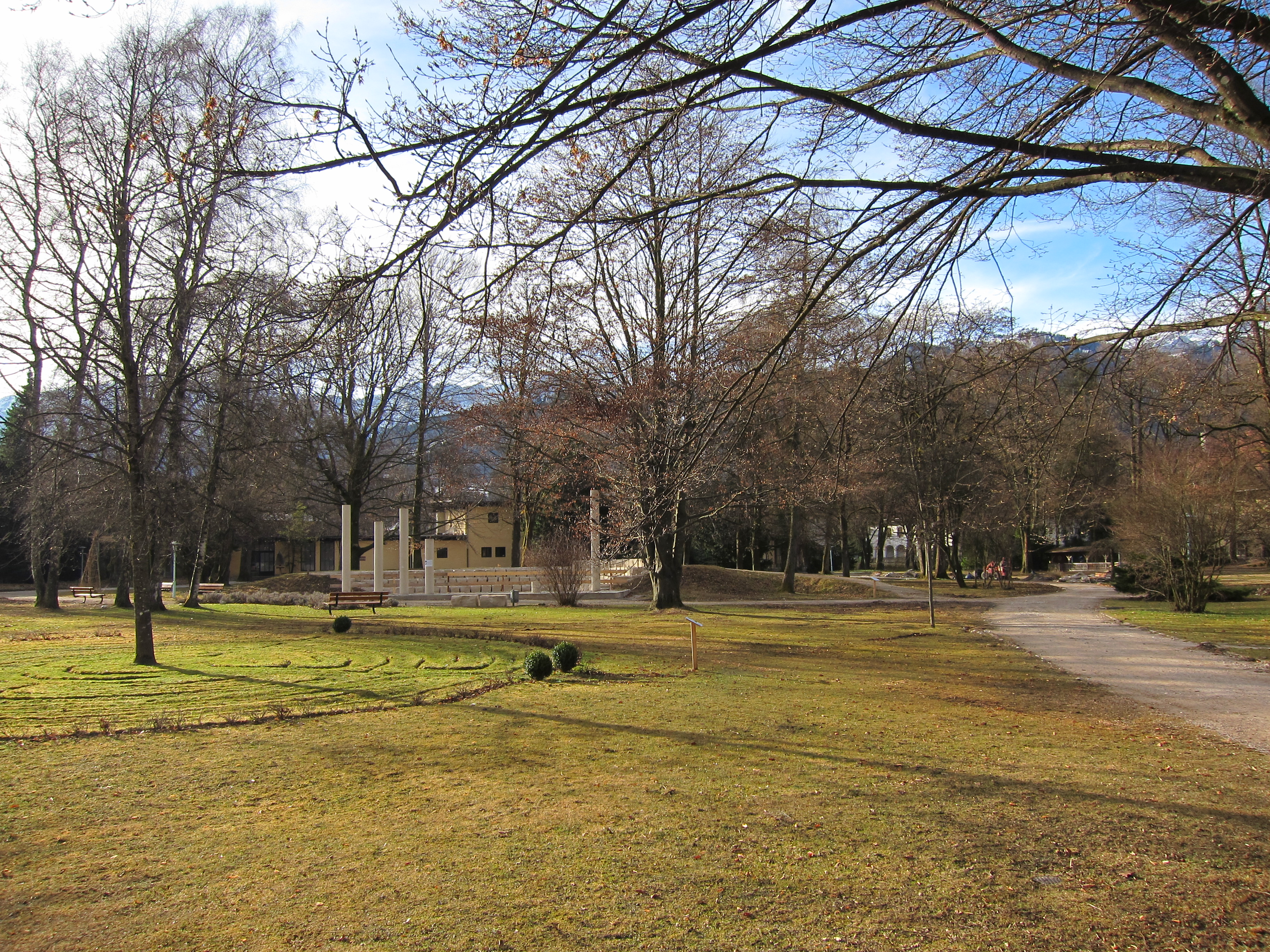 Michael-Ende-Kurpark in Garmisch-Partenkirchen: die Michael-Ende-Linde mit Rasenlabyrinth und dahinter das Amphitheater